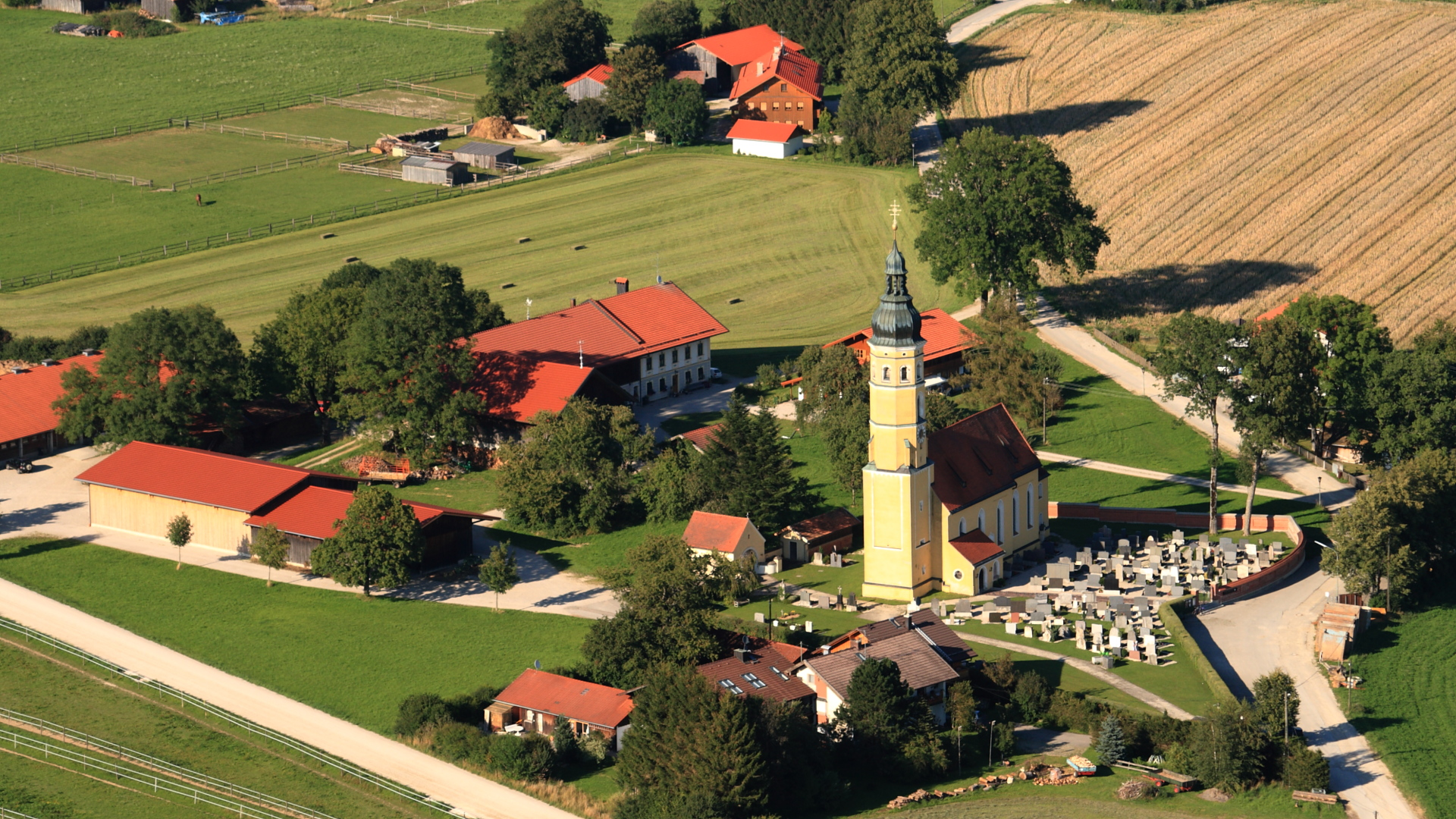 Sauerlach Arget Luftbild der Pfarrkirche St. MichaelThis is a photograph of an architectural monument.